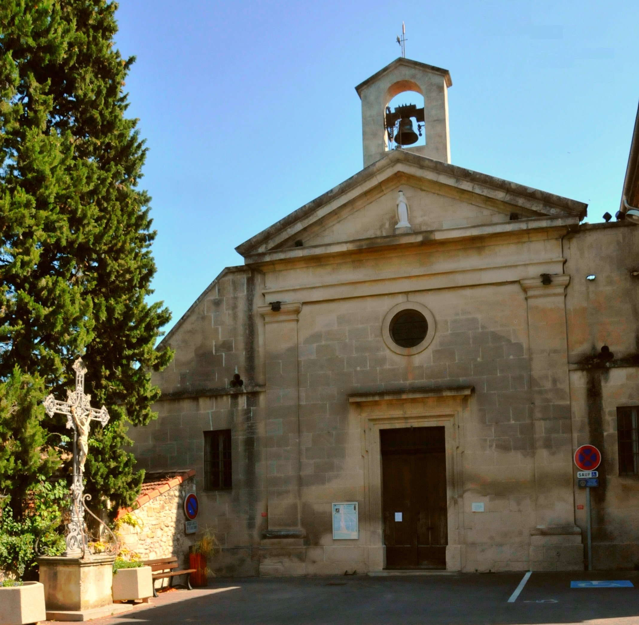 Kirche St. Ètienne in Saint Étienne-du-Grès